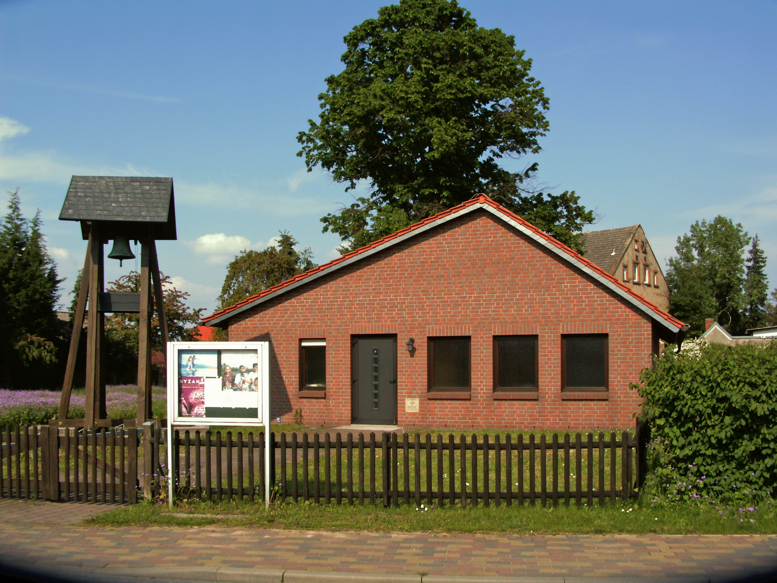 Katholisches Gemeindehaus mit Kapelle Maria Königin in Erxleben, Landkreis Börde